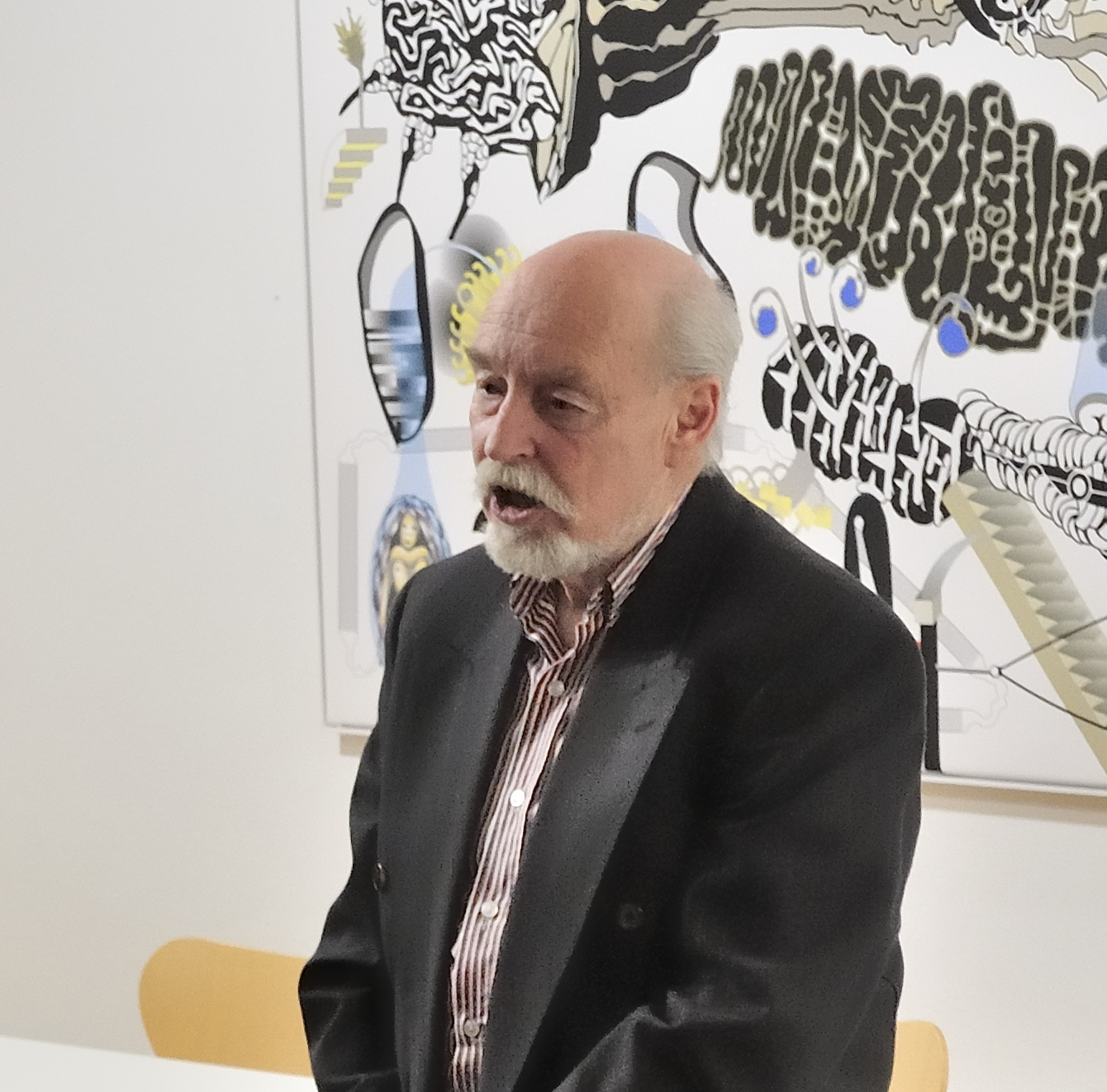 Artur Elmer im Kunstverein Aalen (2016)